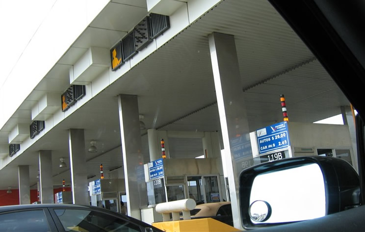 Tipo de cambio en dolar y pesos en la frontera con San Diego/Tijuana